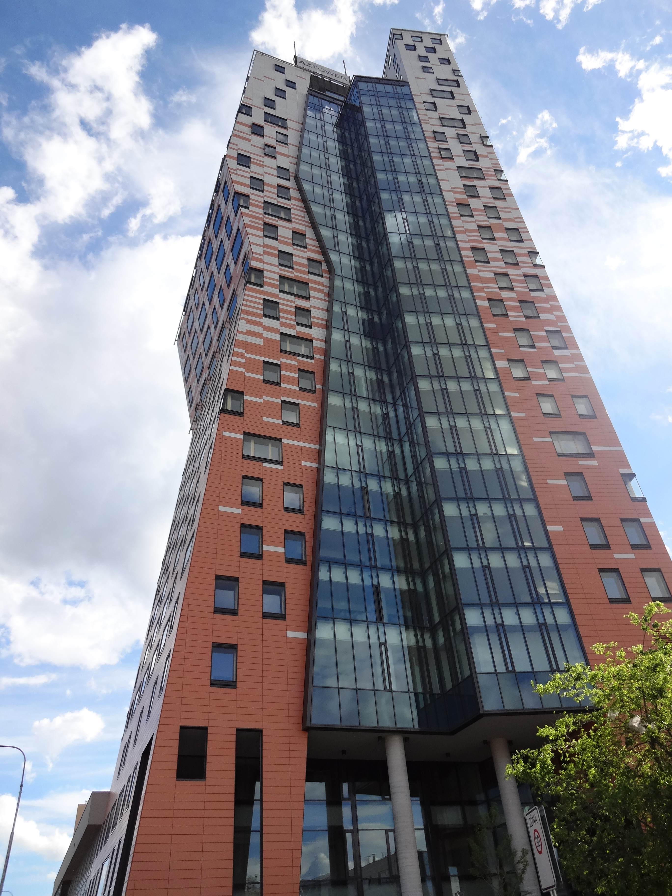 Budova AZ Tower v Brně. Jedná se o současnou nejvyšší budovu v ČR s výškou 111 m